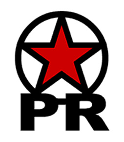 Српски (ћирилица): Симбол Партије рада Srpski (latinica): Simbol Partije rada